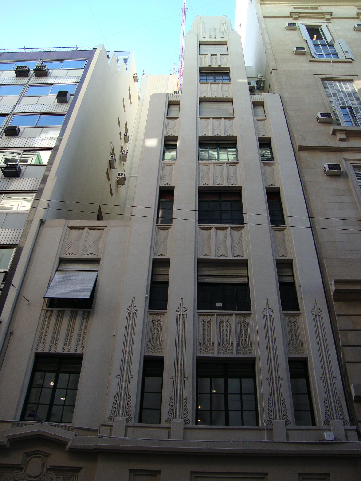 Vista parcial del edificio proyectado para la Compañía de Seguros "London & Lancashire" por los arquitectos Calvo, Jacobs y Giménez. Actualmente aloja parte de la Secretaría de Inteligencia. 25 de Mayo nº 33. Buenos Aires, Argentina. Nota: El reducido ancho de la calle y la altura del edificio impiden una vista completa adecuada de la fachada.